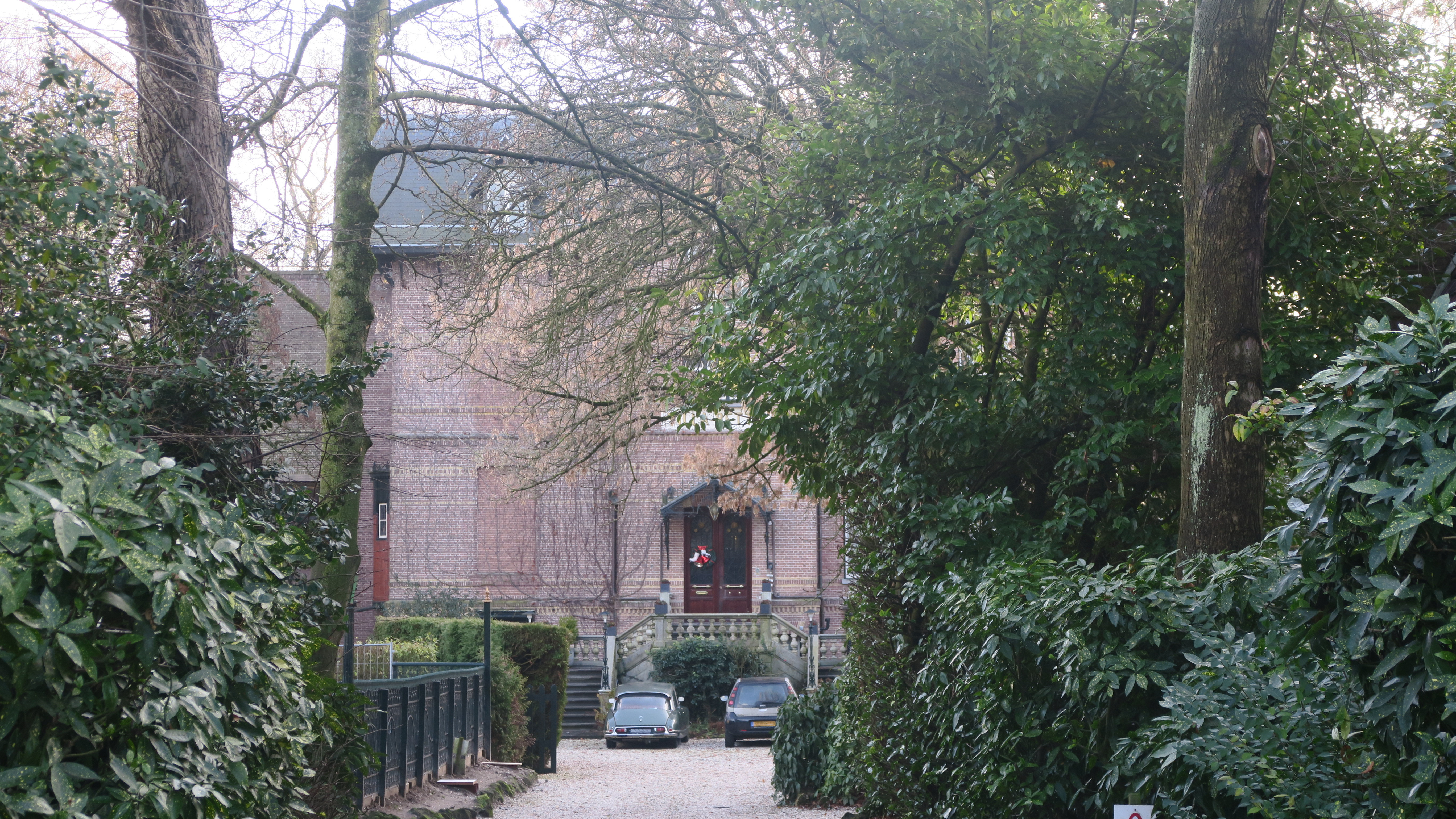 Villa Betty, gezien vanaf de Overtoom